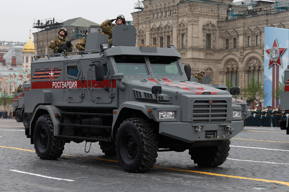 В Москве прошел парад в честь 74-й годовщины Победы в Великой Отечественной войне